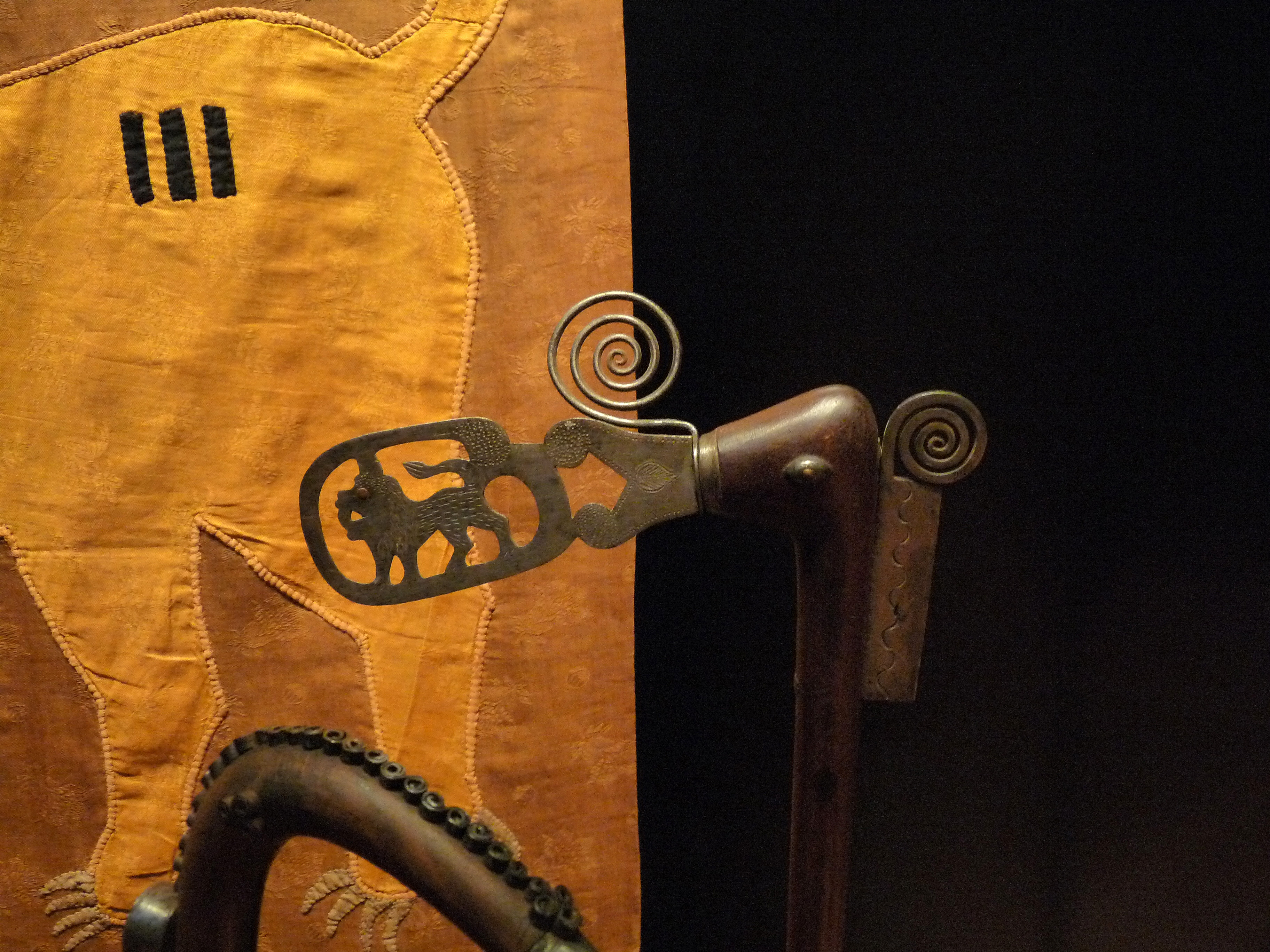 Récade à l'emblème de Glèlè roi du Danhomè (1858-1889). La lame porte l'image d'un lion, réalisée sur commande de l'administrateur colonial Auguste Le Hérissé. Vers 1910. Musée du quai Branly